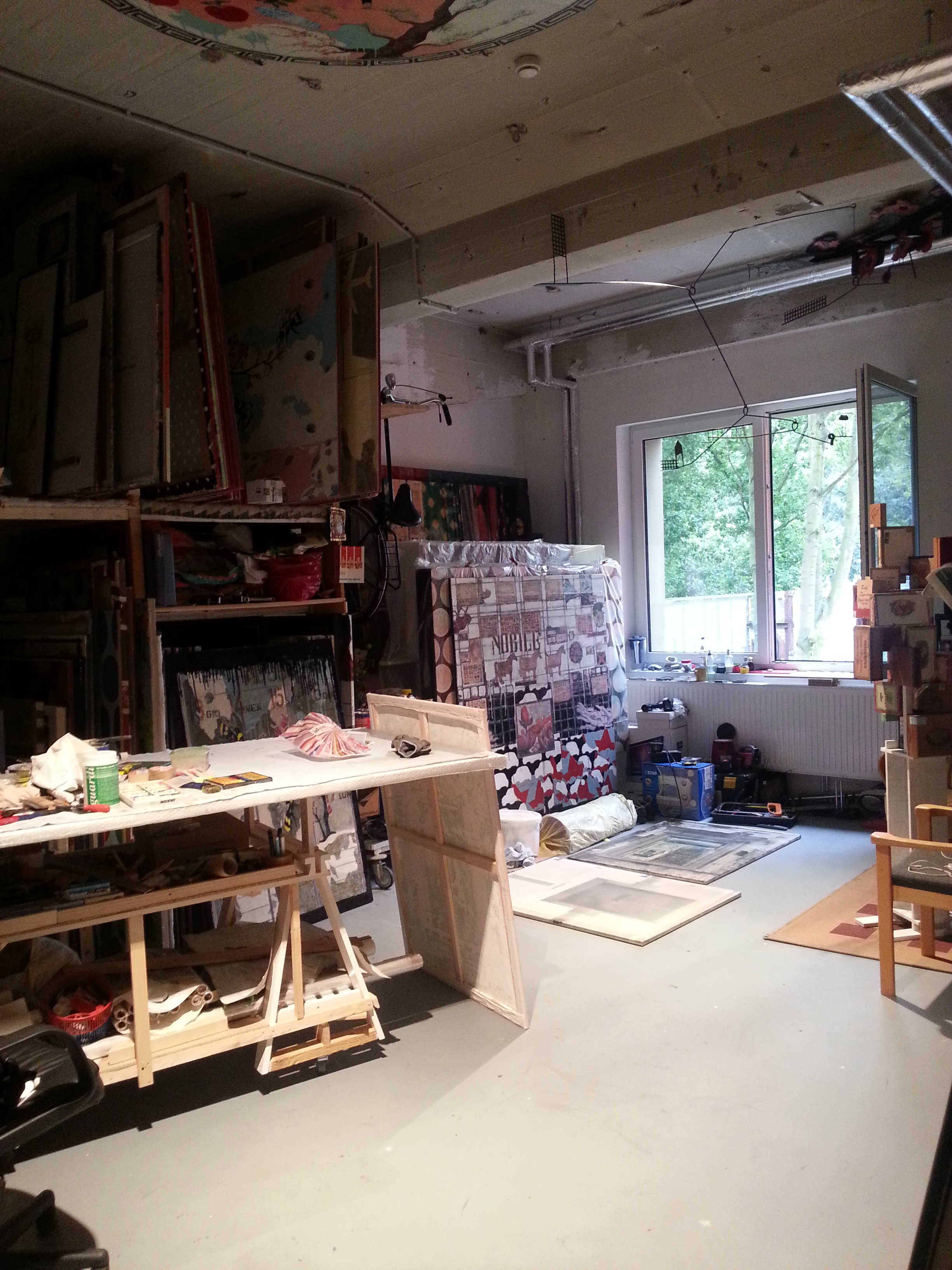 In the picture you can see a summary of the study perspective Paolo Moretto